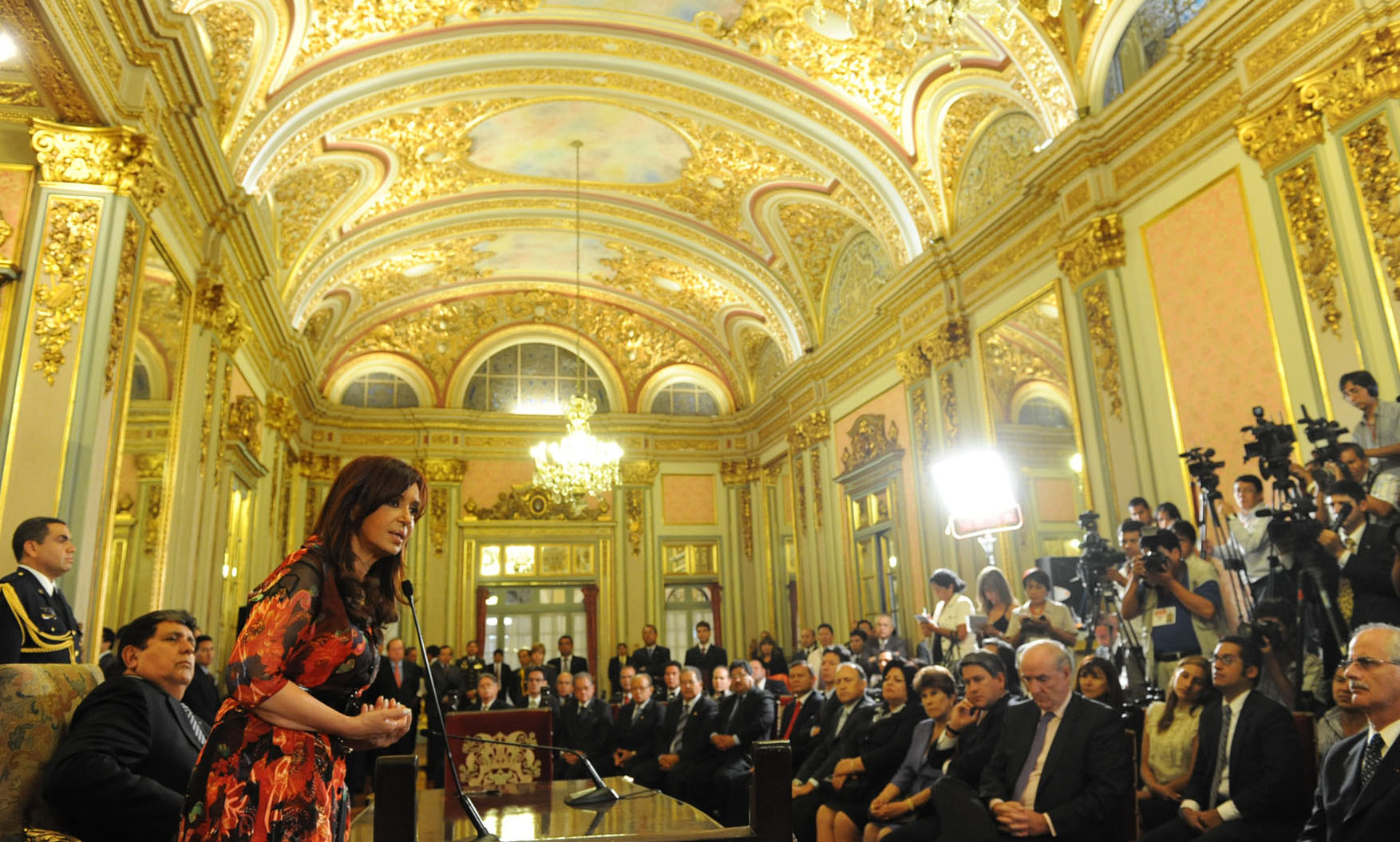 La Presidenta argentina Cristina Fernández de Kirchner expone en Lima ante las delegaciones de Argentina y Perú, en el Palacio de Gobierno de Lima. Sentado el presidente Alan García